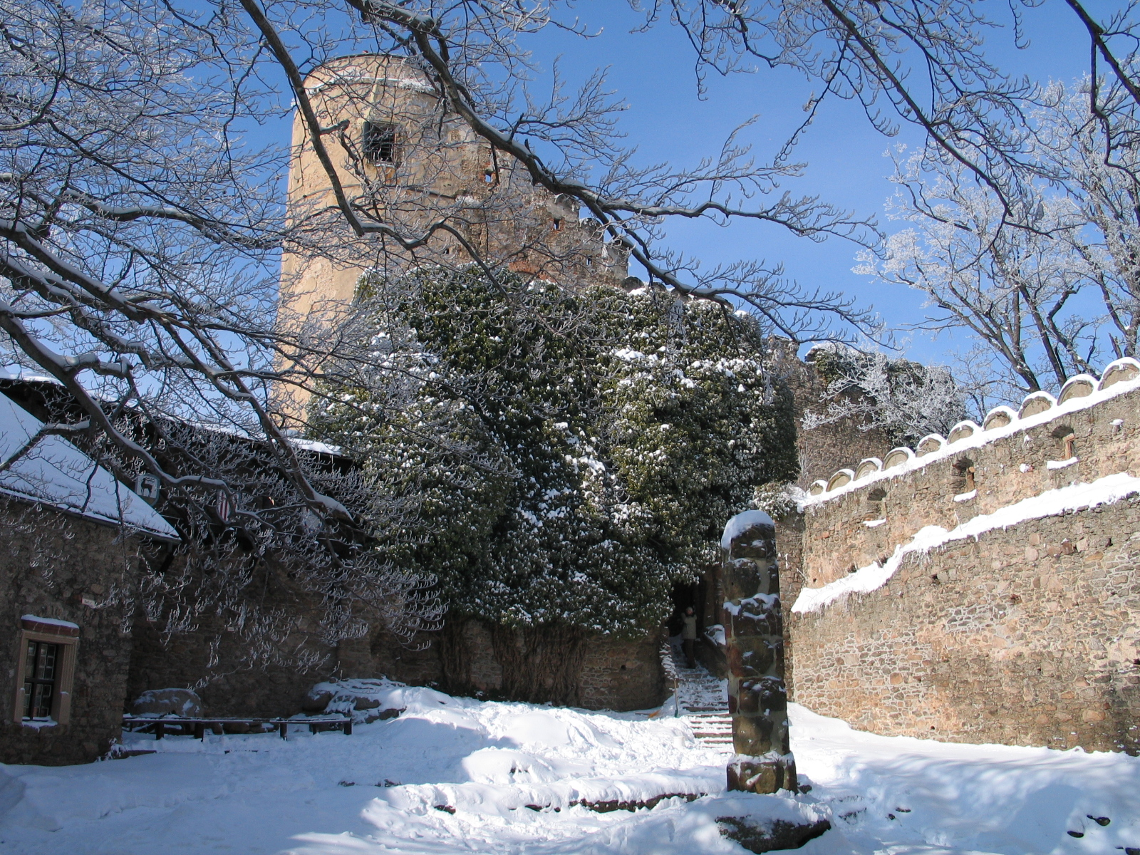 Dziedziniec zamku Chojnik. Na pierwszym planie pręgierz. Jestem autorem tego zdjęcia i nadaje mu status PD.